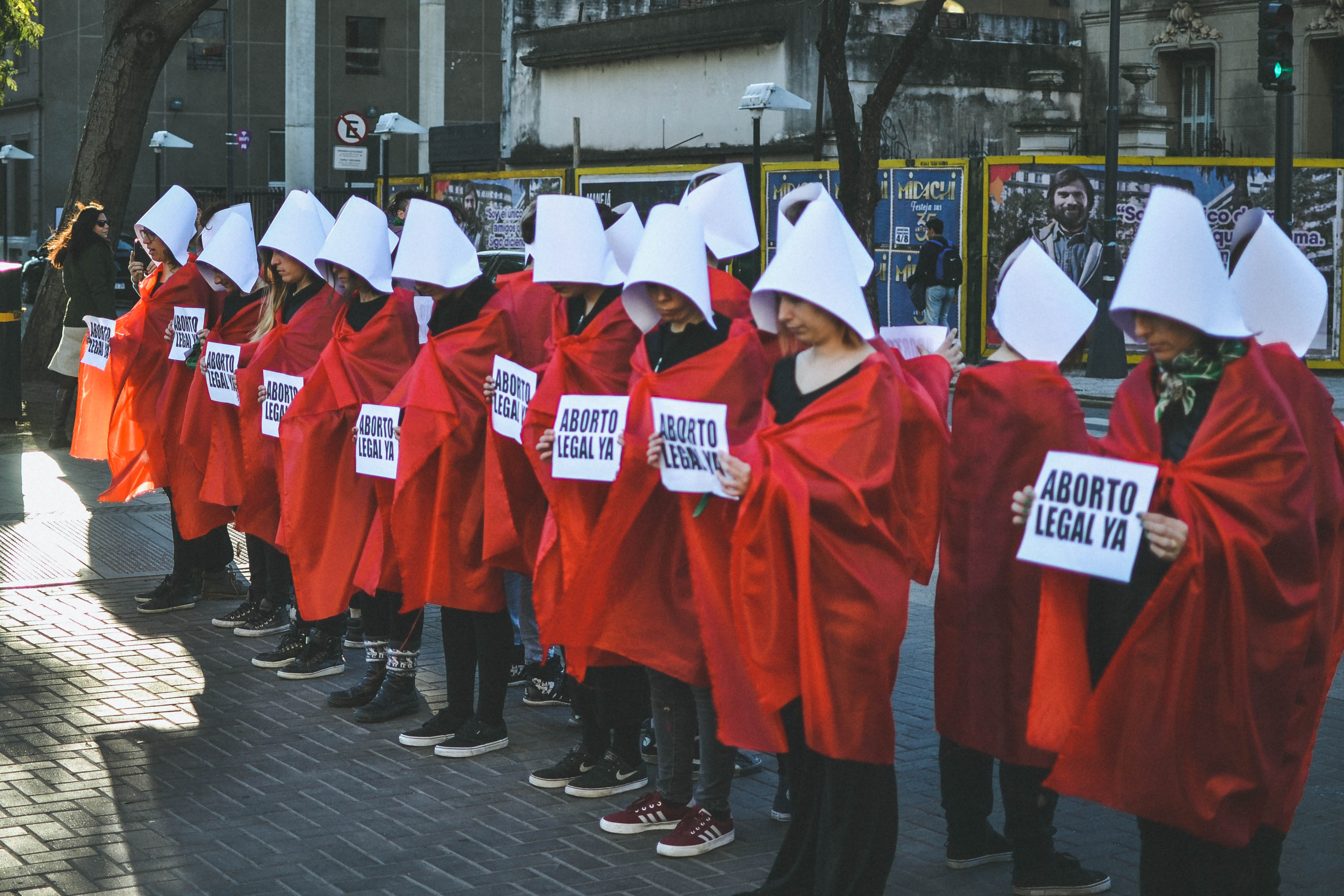 Intervención the handmaid's tale en Santa Fe por el aborto seguro legal y gratuito en Argentina